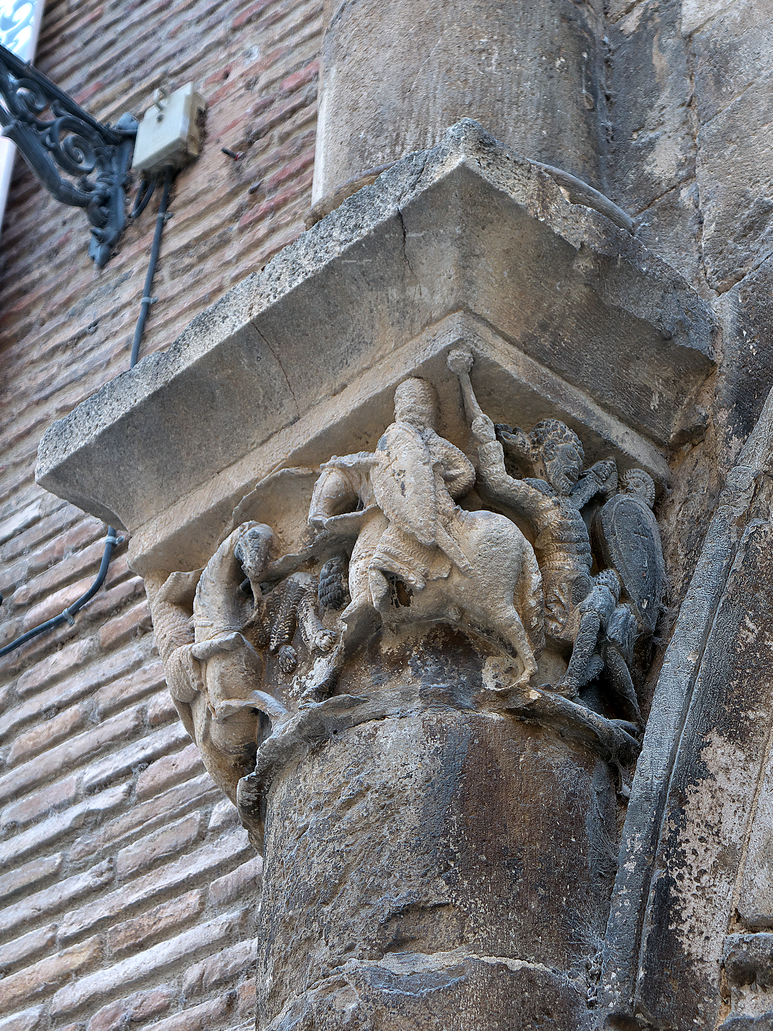 Palacio de los Reyes de Navarra, Estella. Roldán contra el gigante Ferragut, o la lucha permanente del Bien contra el Mal, capitel moralizador del maestro Martín de Logroño, según la leyenda carolina.